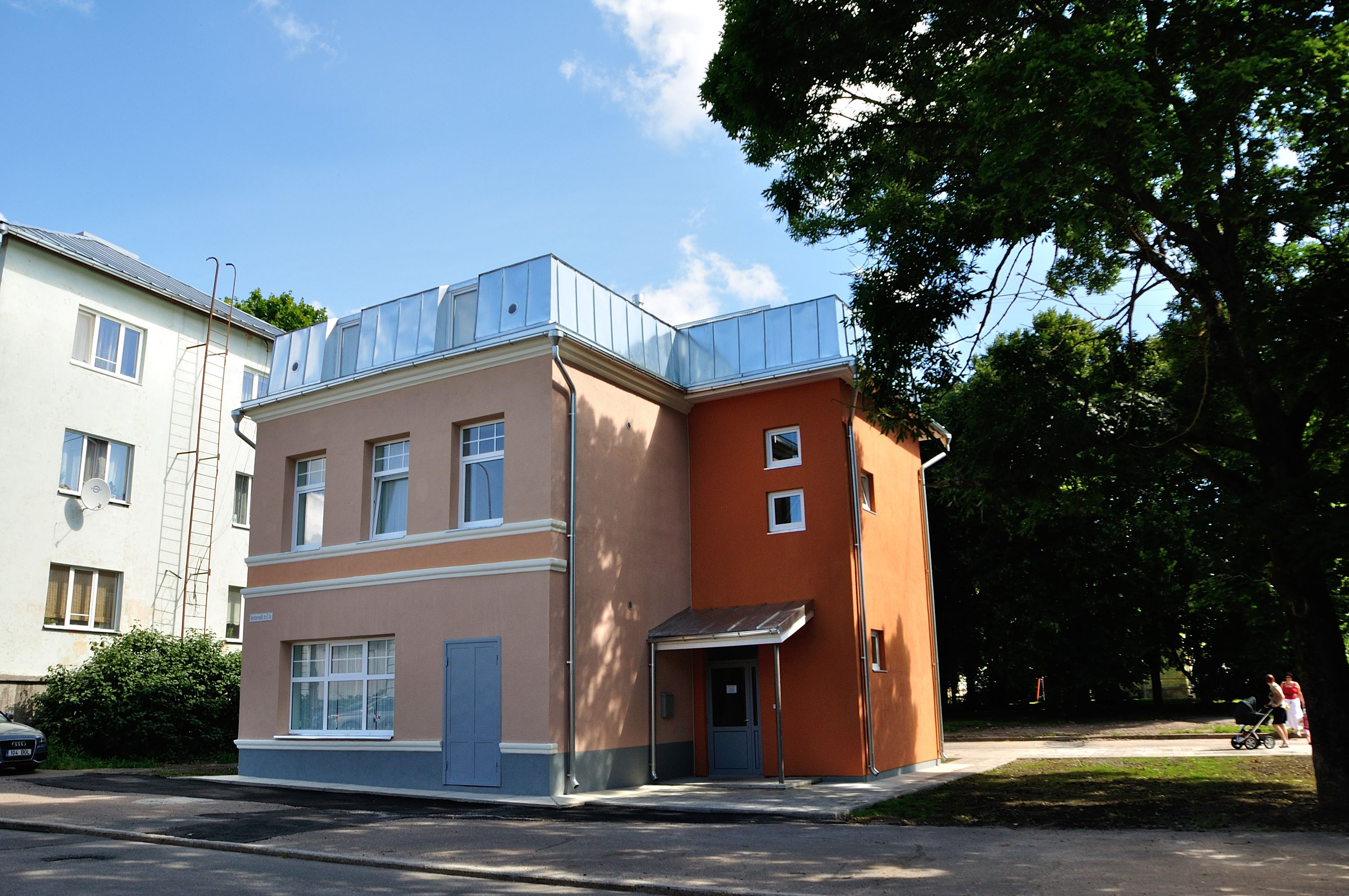 Vestervalli 2A. (красный крест)